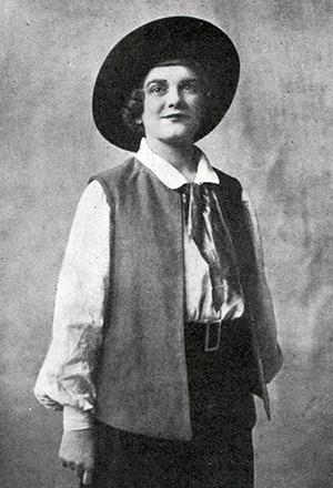 Karin Alfheim (1892-1970) som Oscar i En maskeradbal. (Scenen 1927).